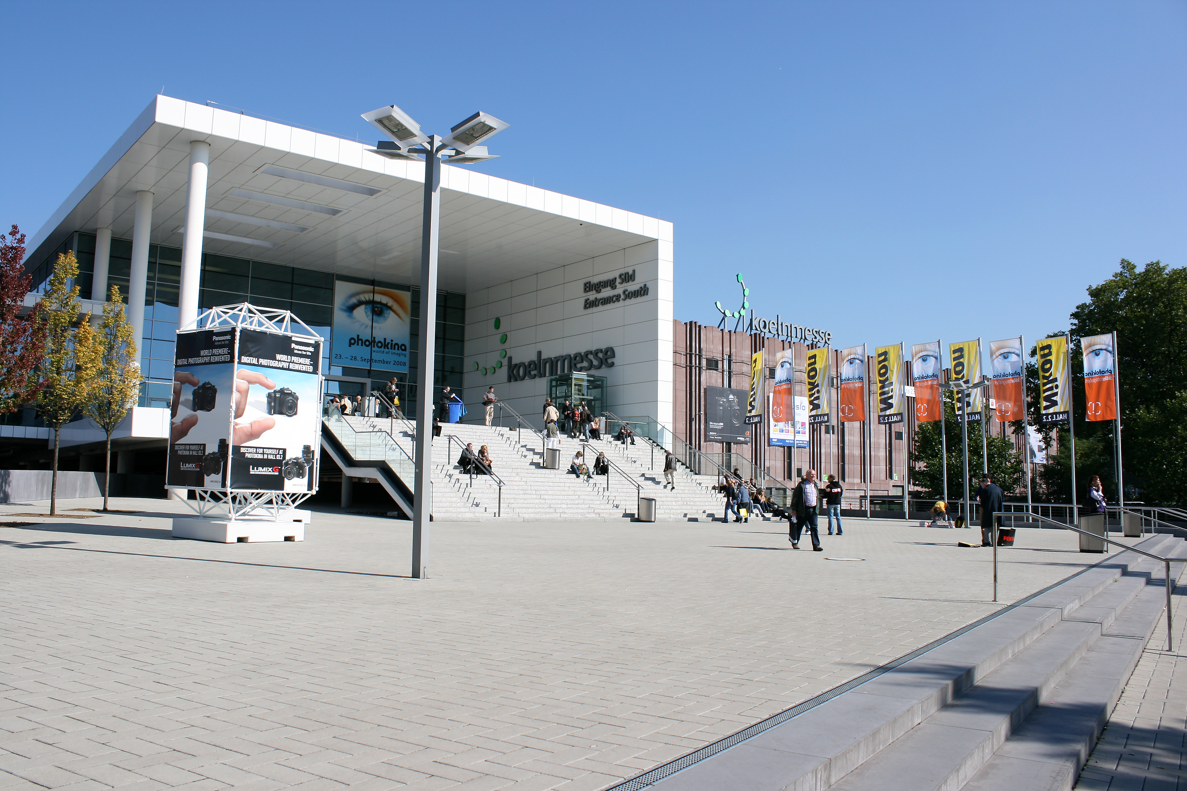 der Südeingang der koelnmesse während der Photokina 2008